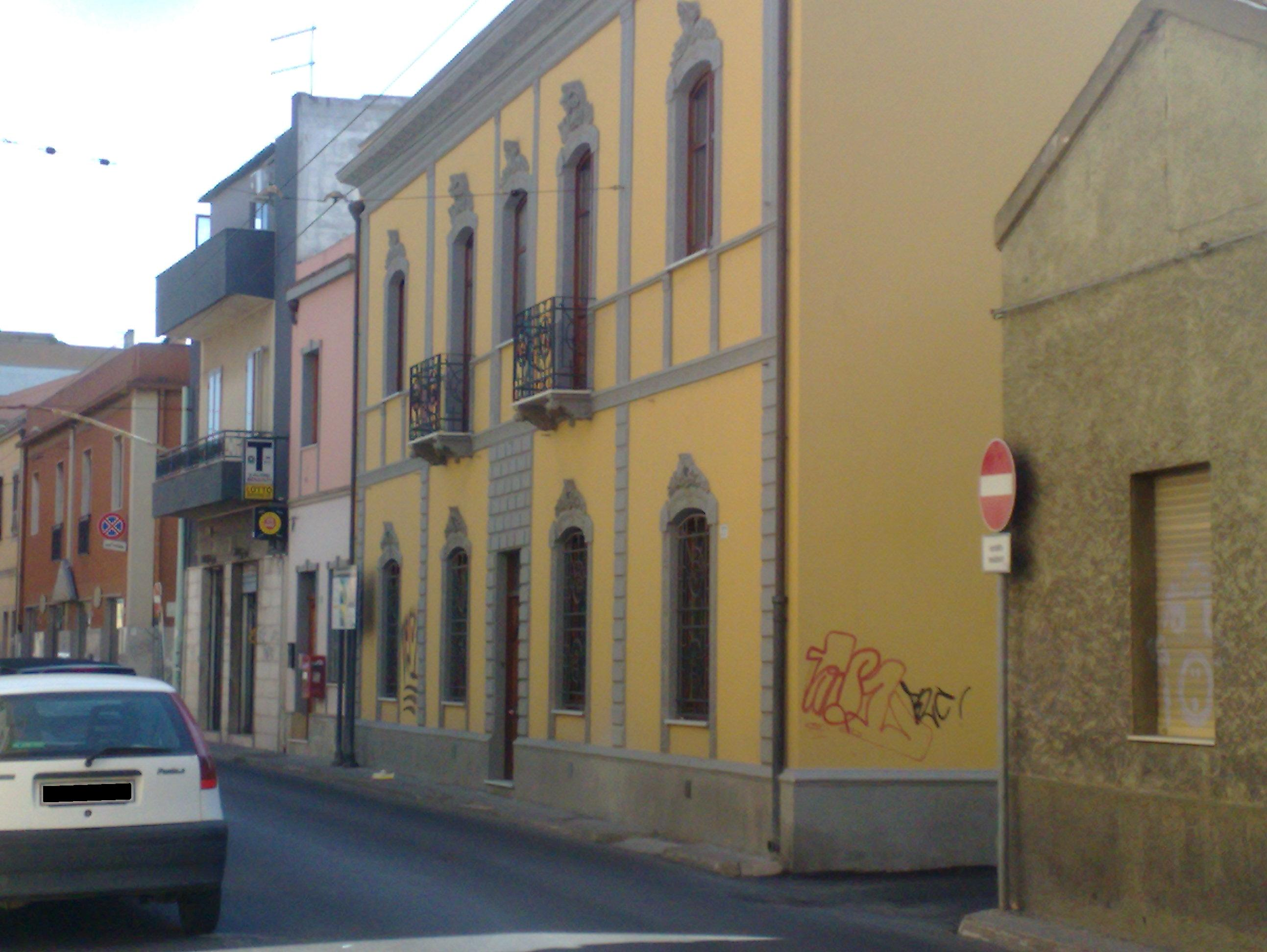 La casa Portas-Perseu oggi. Foto scattata da me l'11 settembre 2009 con cellulare N95